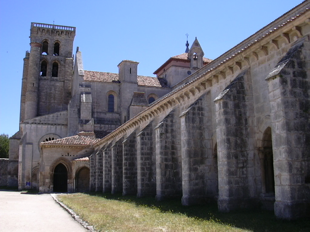 Monasterio de Santa María la Real de Las Huelgas de Burgos (España)